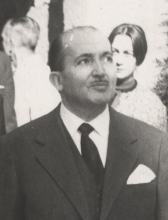 Título original: Visita de ministros dentro de los actos conmemorativos del Tricentenario de la Paz de los Pirineos y II Reunión Hispano-francesa de estudiantes universitarios : visita por calles del casco antiguo y castillo